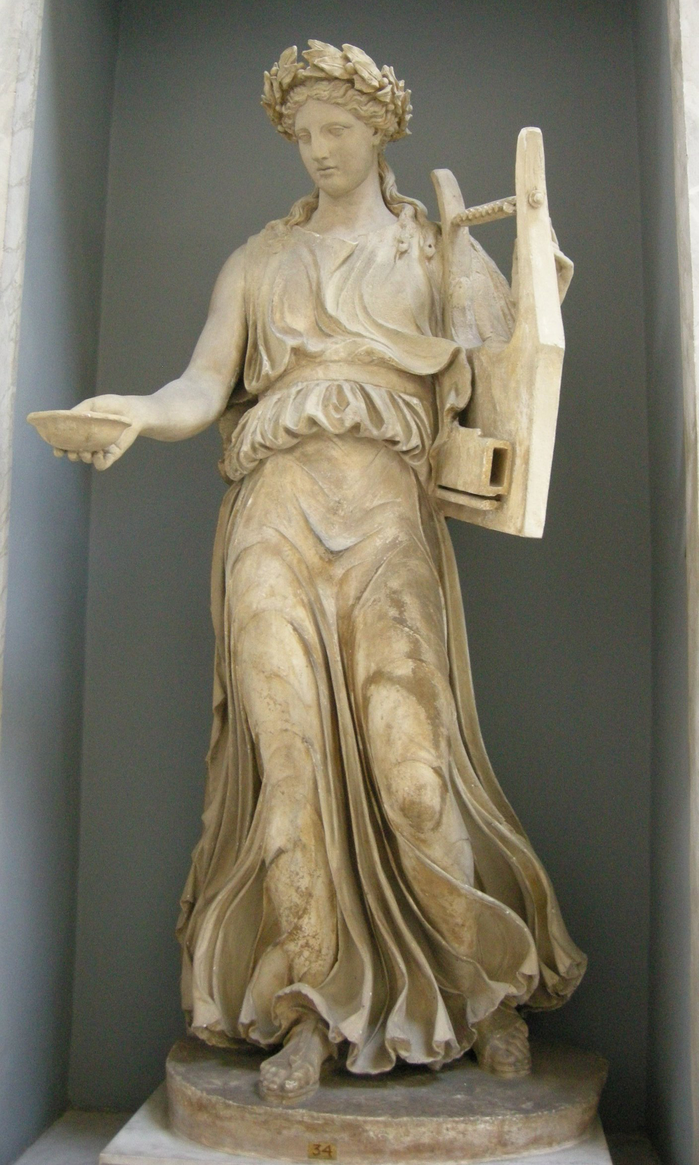 Apollo citaredo, rielaborazione romana da originale greco del V secolo ac., testa di restauro, da marino, inv. 2274